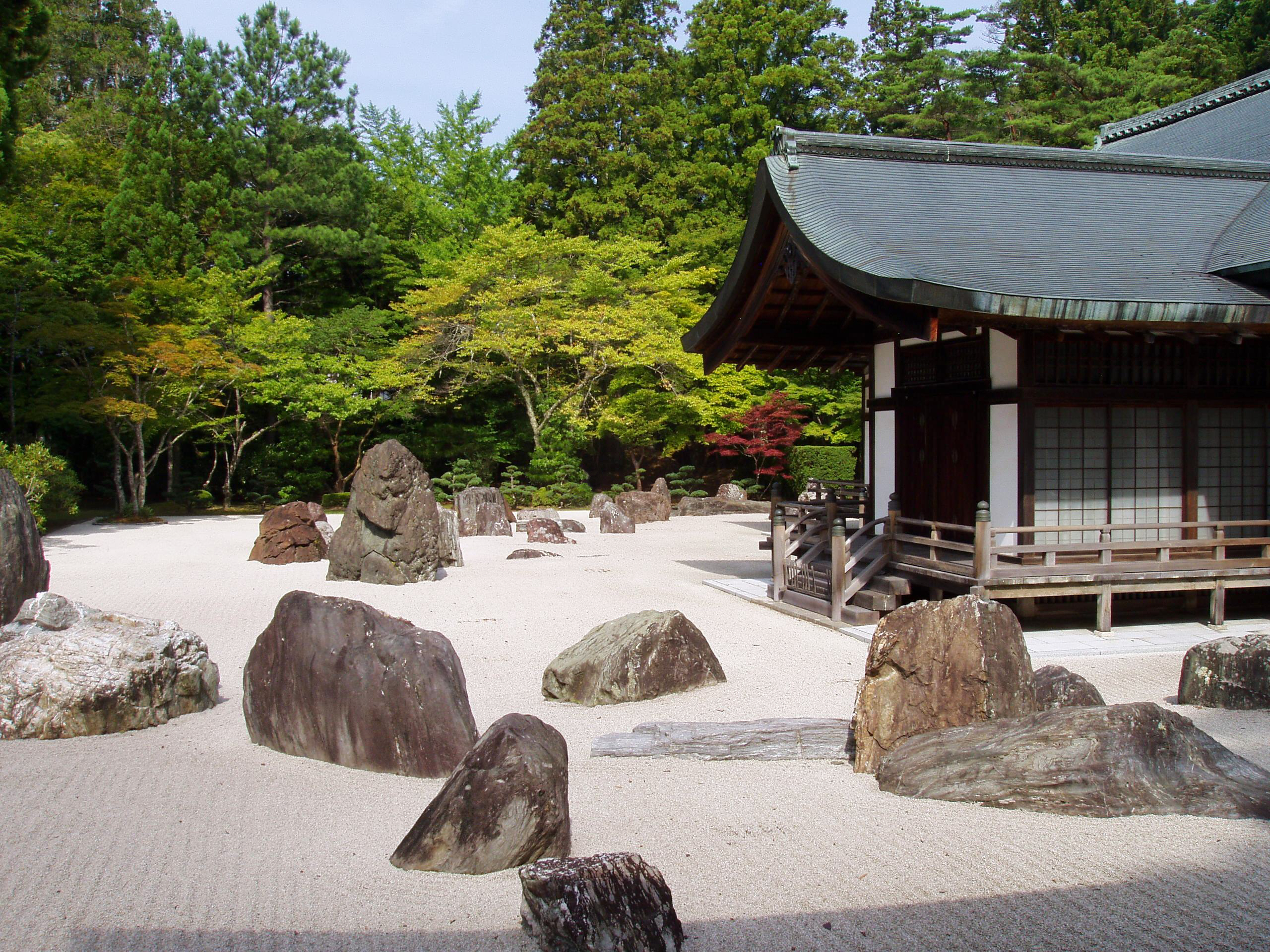 Kongobuji Temple, Koyasan, Wakayama prefecture, Japan. Banryutei rock garden.